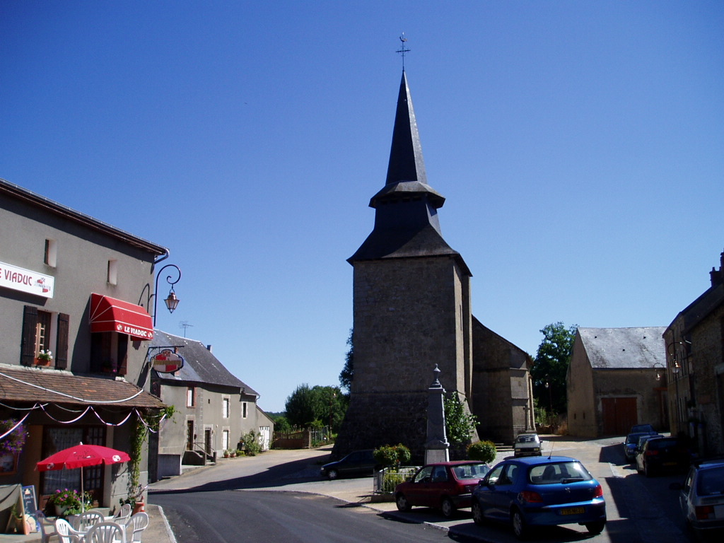 Place de l'église